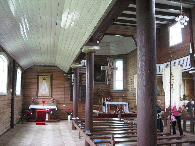 Далёкія. Касцёл Святога Станіслава